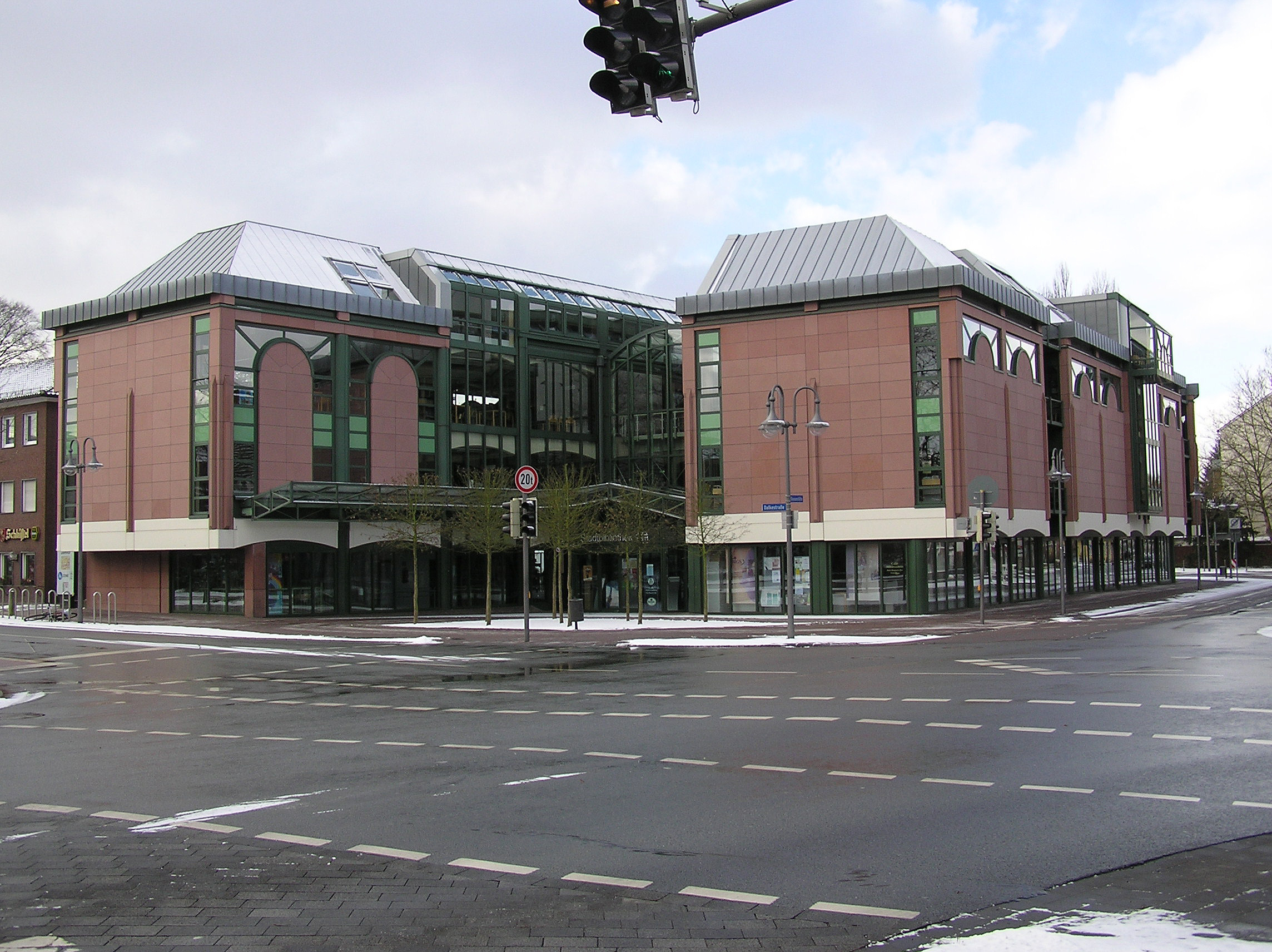 Stadtbibliothek in Gütersloh